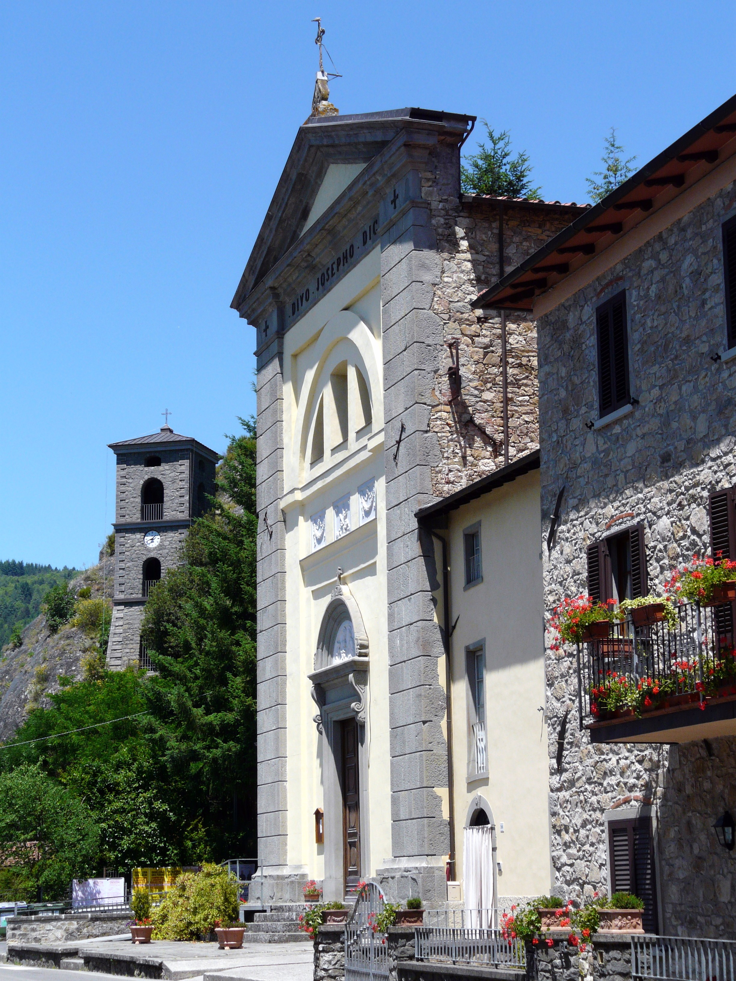 La chiesa di San Giuseppe a Villetta, San Romano in Garfagnana, Toscana, Italia